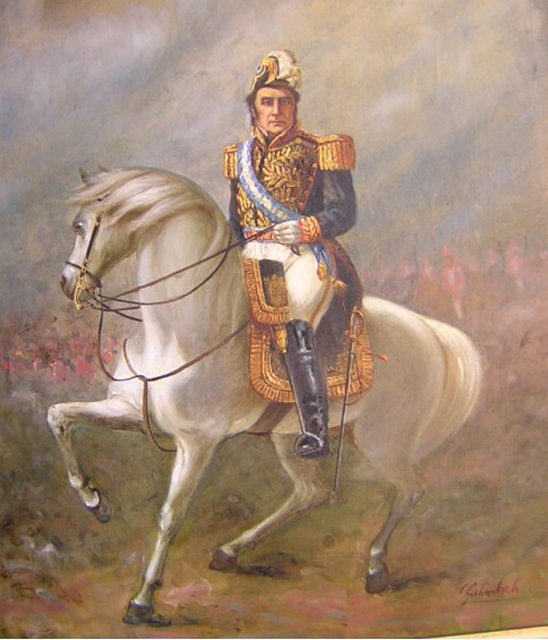 Retrato ecuestre del Gral. Justo José de Urquiza (1801-1870).